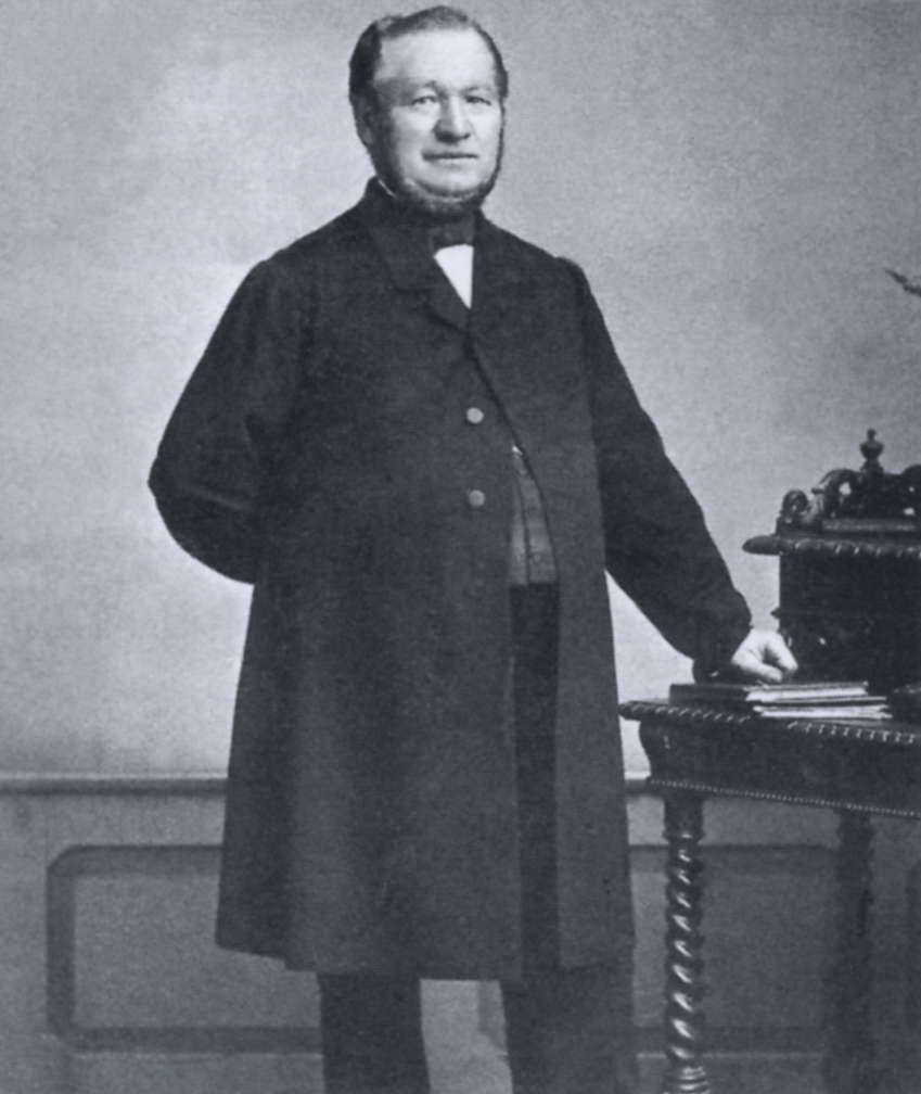 Friedrich Michael Münzing († 1879), Chemiefabrikant aus Heilbronn